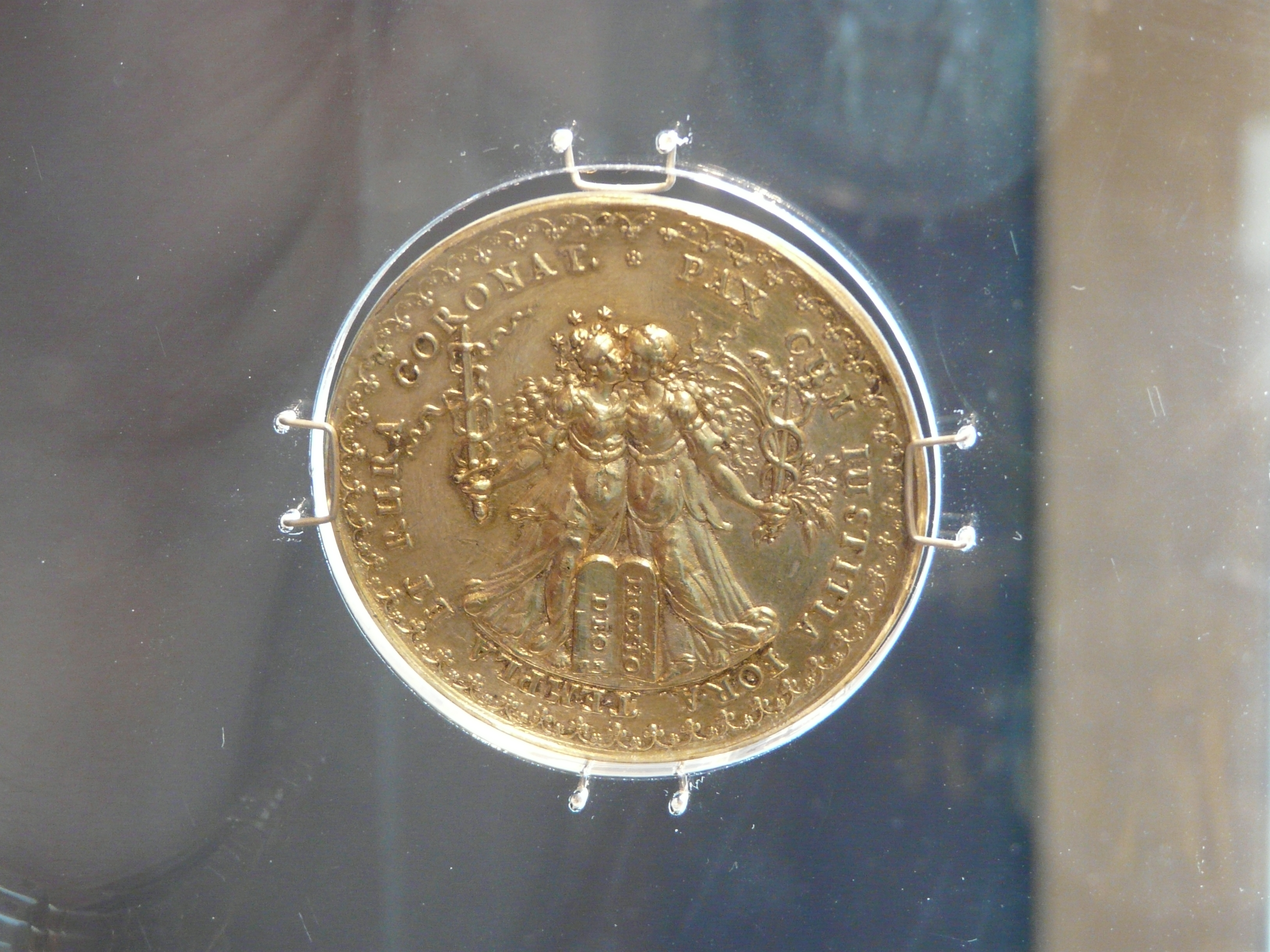 From the collection of the National Museum in Poznań. Gdański medal pokojowy: rozejm w Sztumskiej Wsi, 1635. Pocałunek sprawiedliwości i pokoju.